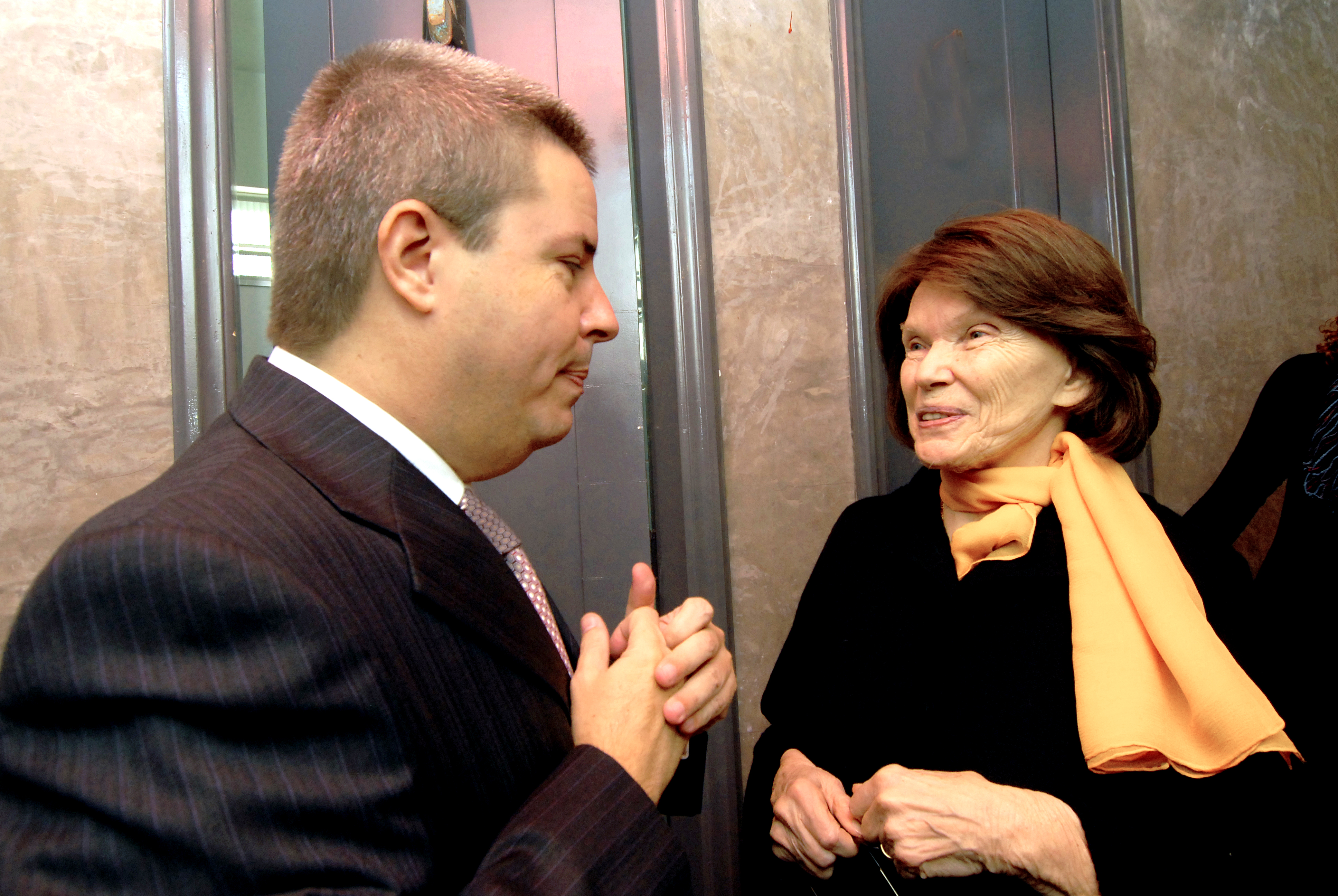 O governador Antonio Anastasia com a presidente da Fundação France Libertés, Danielle Mitterrand, durante encontro com representantes do movimento dos catadores de materiais recicláveis de Minas. O encontro contou com a presença de representantes do Centro Mineiro de Referência em Resíduos, do Movimento Nacional dos Catadores de Materiais Recicláveis de Minas Gerais (MNCR/MG), de ONGs e empresários. Crédito: Carlos Alberto/Imprensa MG